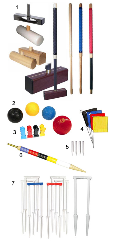 Оборудование для игры в крокет. 1 - молотки (разновидности). 2 - шары. 3 - клипсы (зажимы). 4 - угловые флажки. 5 - угловые колышки. 6 - центральный колышек. 7 - воротца (разновидности).